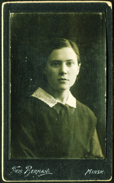 Photographie de Bljuma Zeigarnik enfant